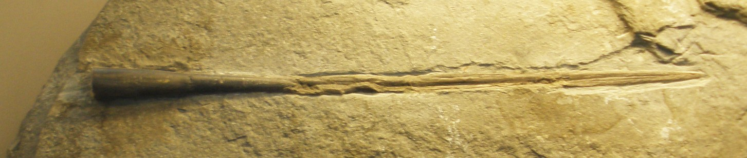 Fossil of Salpingoteuthis, an extinct mollusc Took the photo at Musee d'Histoire Naturelle, Brussels